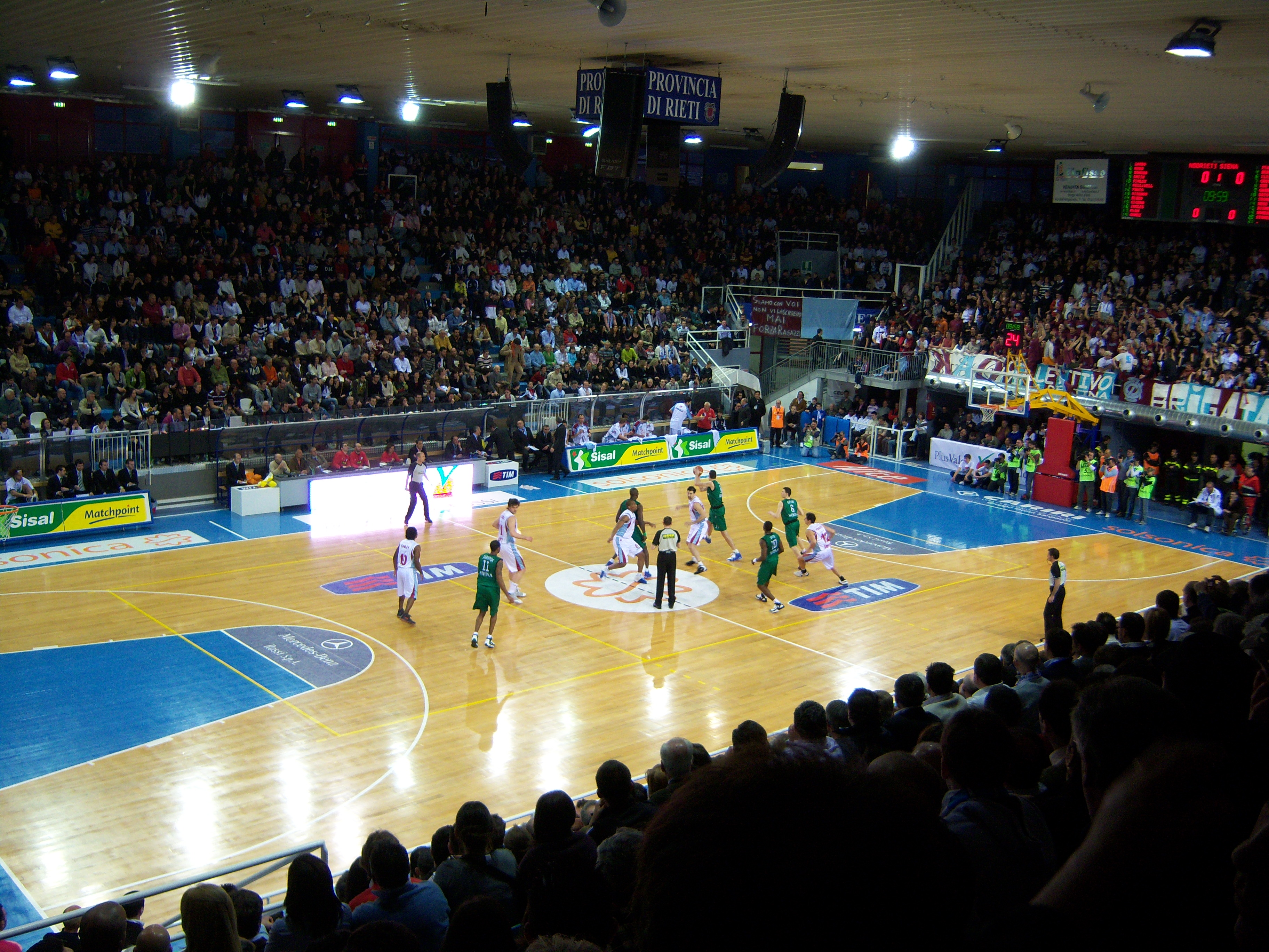 Foto del PalaSojourner durante l'incontro di Serie A di Basket tra la Solsonica Rieti e il Montepaschi Siena.